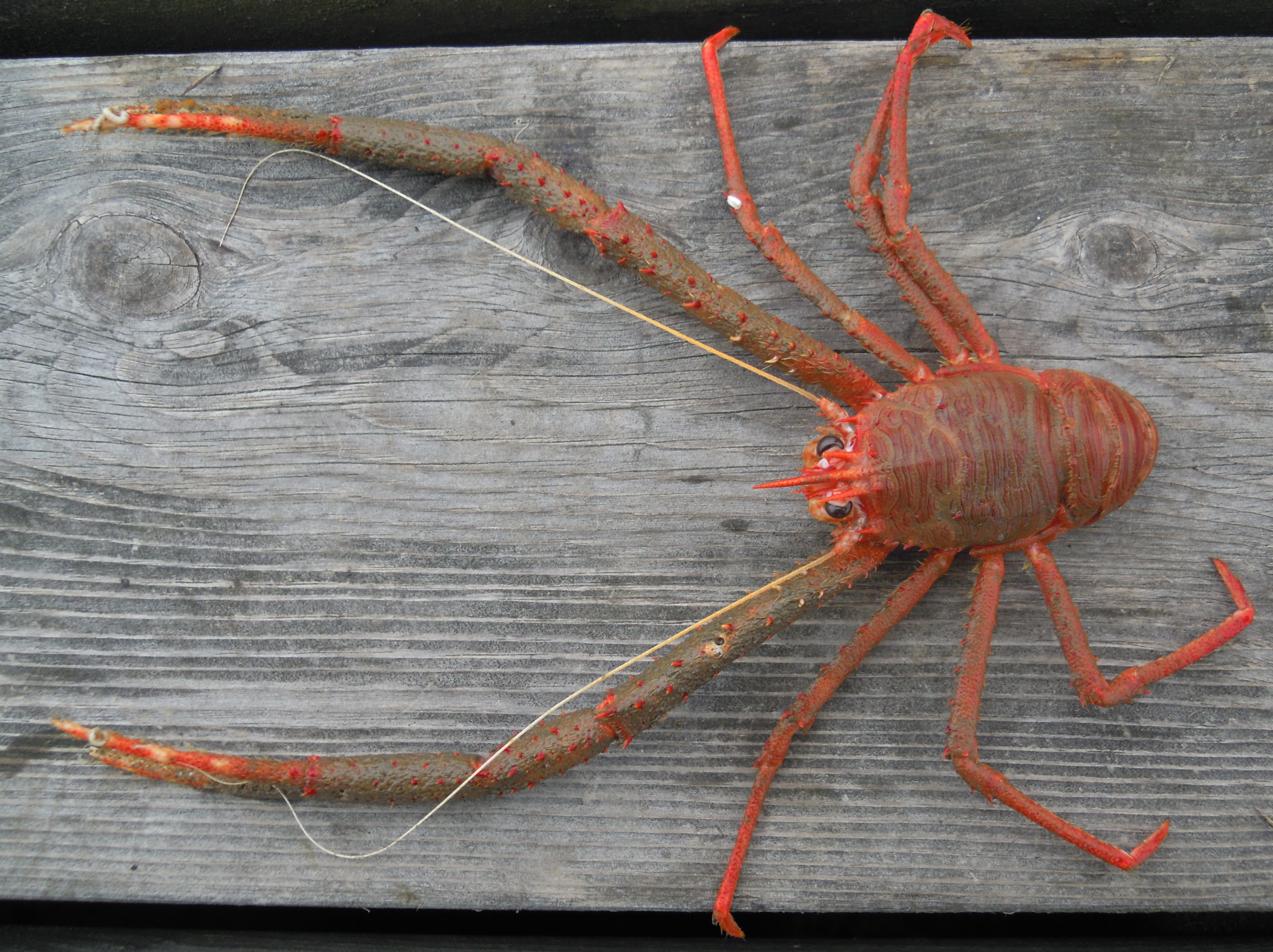 Langfingerkreps - Munida rugosa, Stavern. You are free to use this picture outside Wikipedia (see license), as long as you write: Photo: Arnstein Rønning